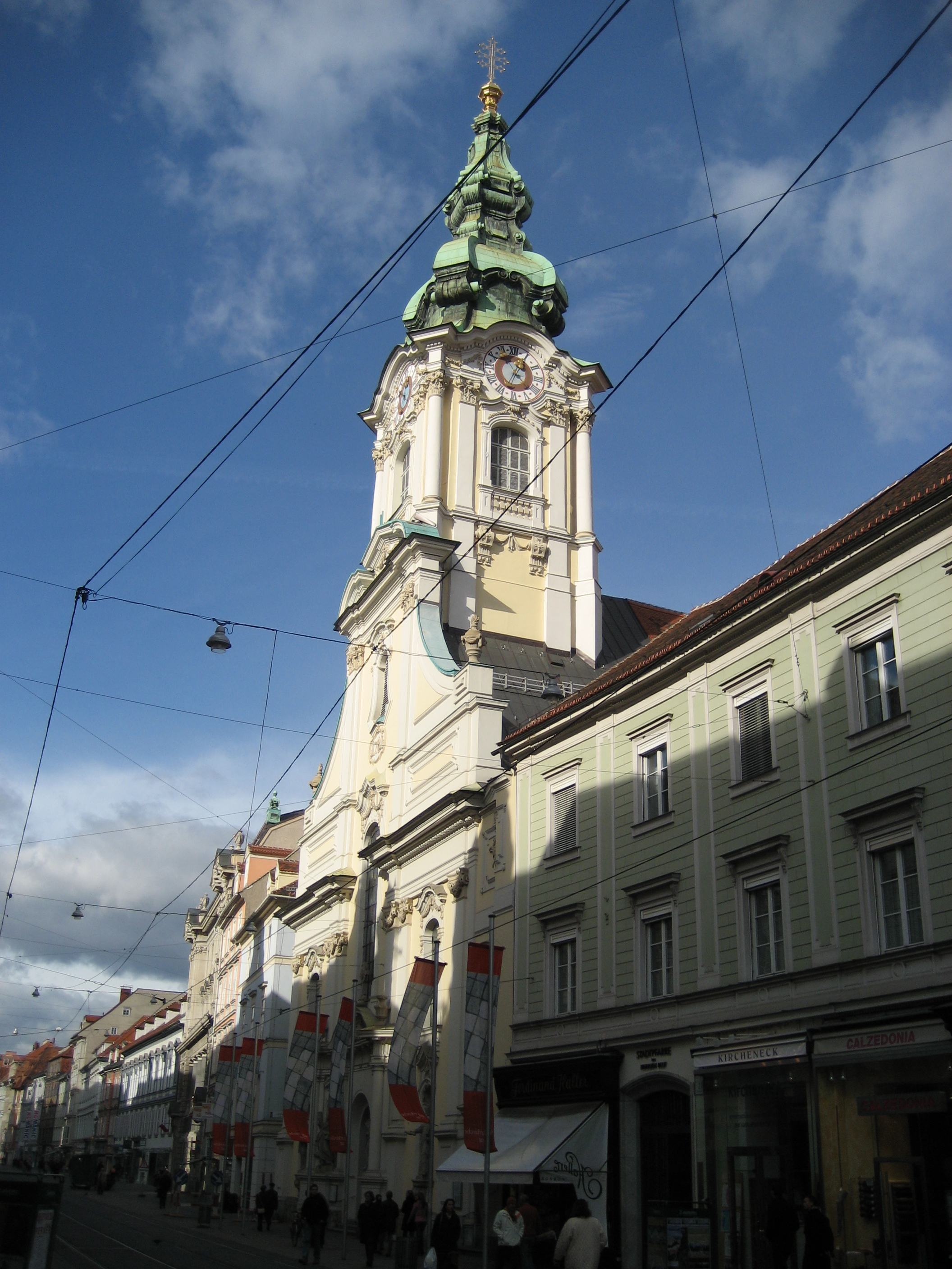 Stadtpfarrkirche Graz, Grazer Stadtpfarrkirche (Austria)